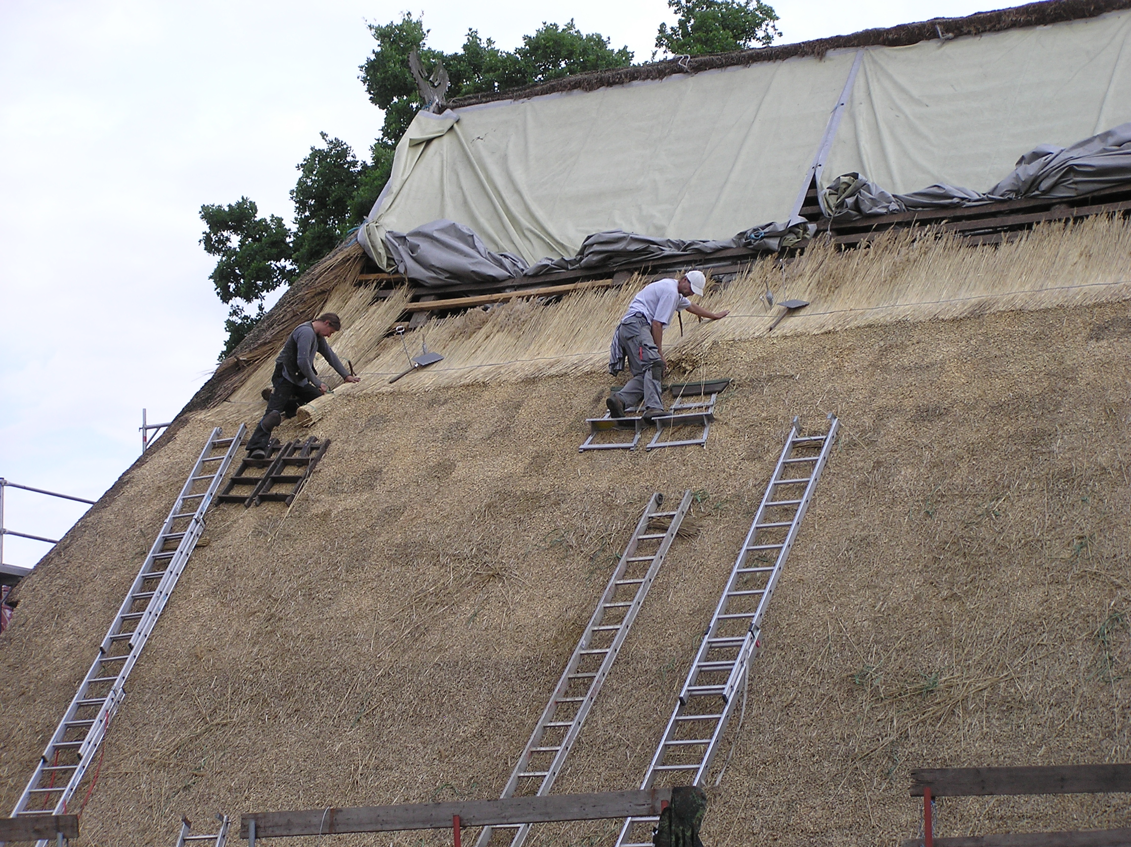 Dachdecker beim Decken eines Reetdachhauses in Escheburg.